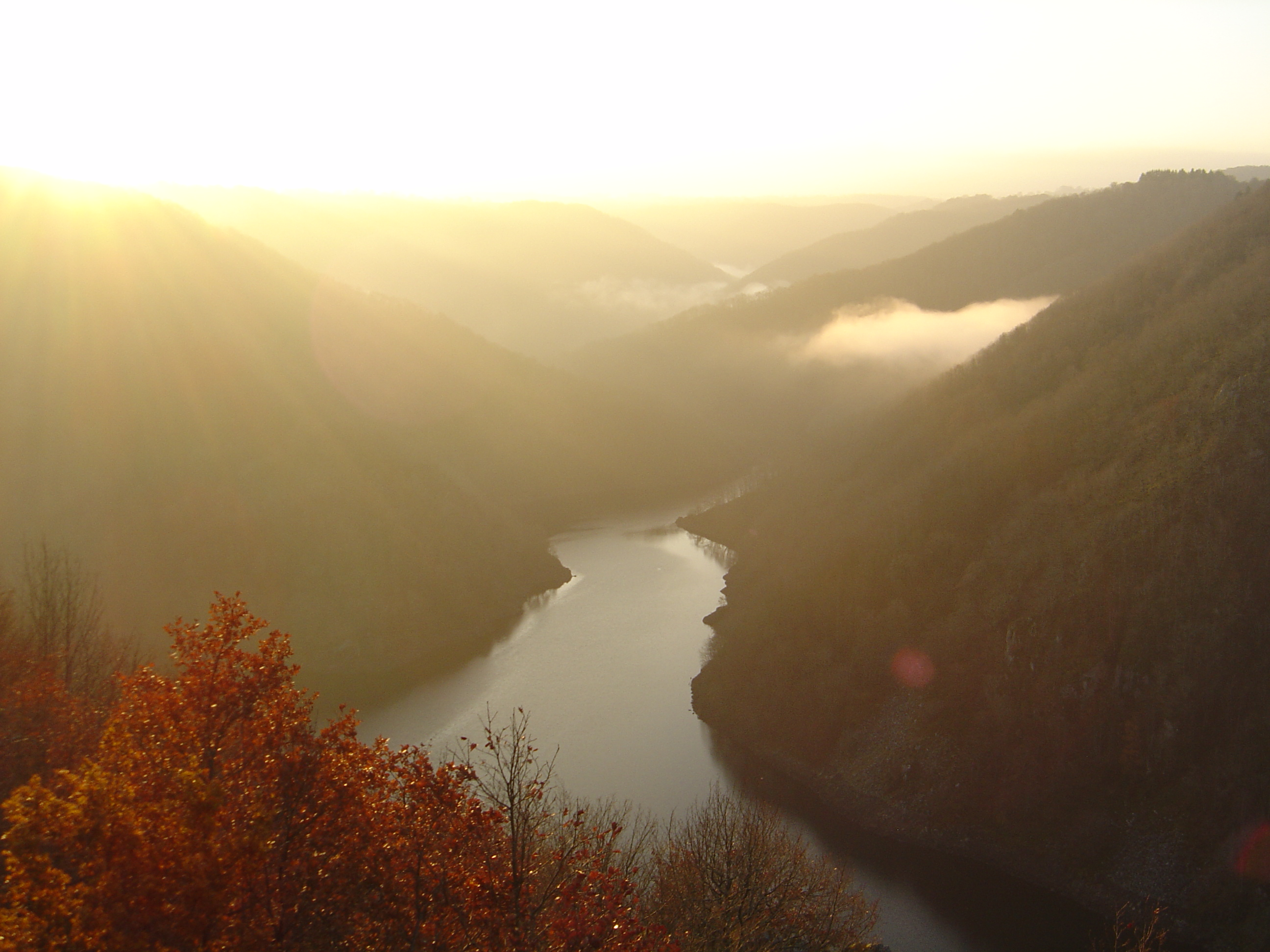 La Sumène (en face) se jette dans la Dordogne (au premier plan, retenue du barrage de l'Aigle) vue depuis le belvédère de Gratte-Bruyère, sur la commune de Sérandon, en Corrèze ; au second plan, communes du Cantal : Veyrières à gauche de la Sumène et Arches à droite.